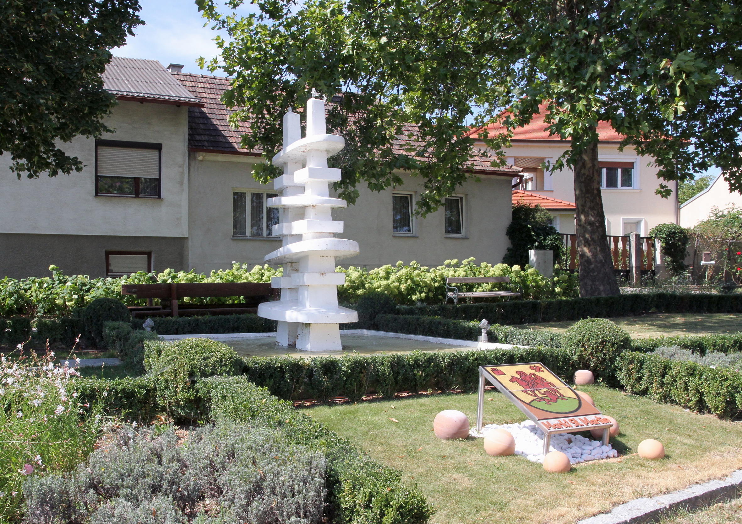 Brunnen in der burgenländischen Marktgemeinde Markt St. Martin. Vom Bildhauer Rudolf Kedl 1960 auf dem Anger errichtet.